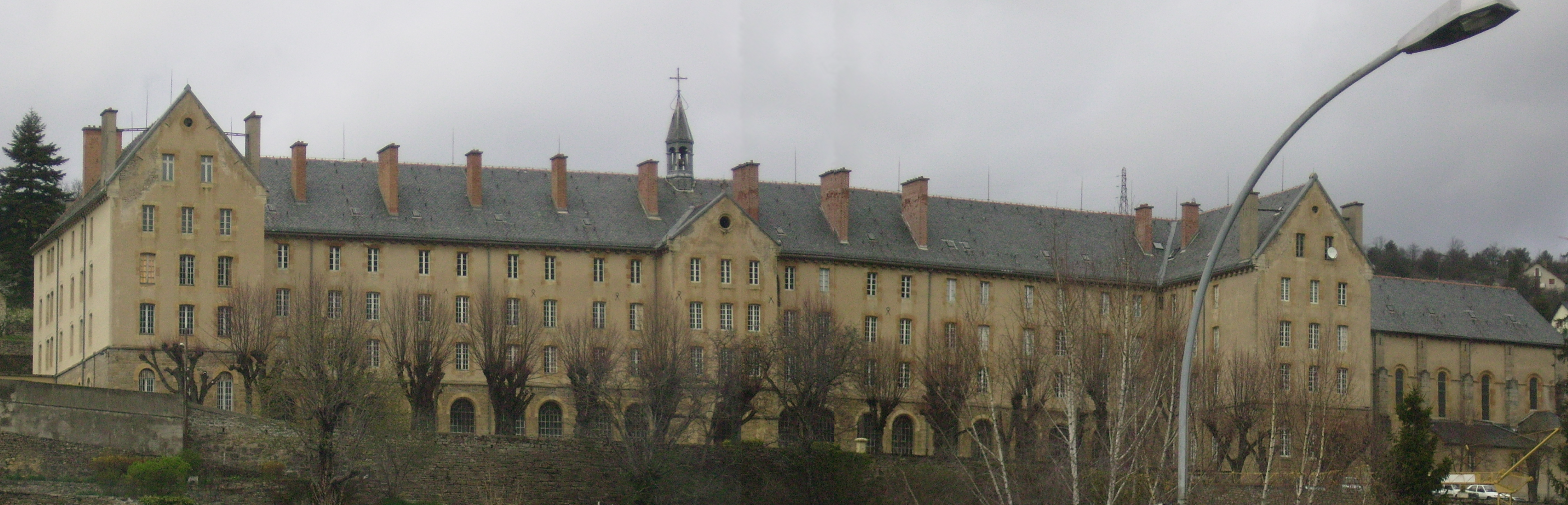 A private school, Mende (France)